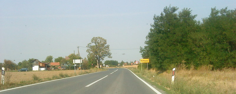 Srpski (latinica): Petlovac jugozapad